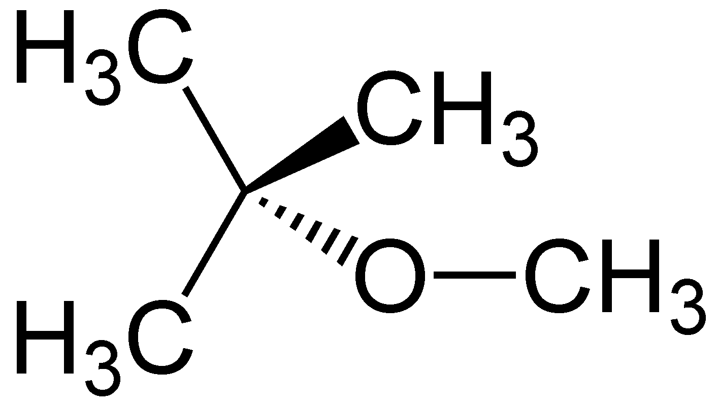 Strukturformel von MTBE